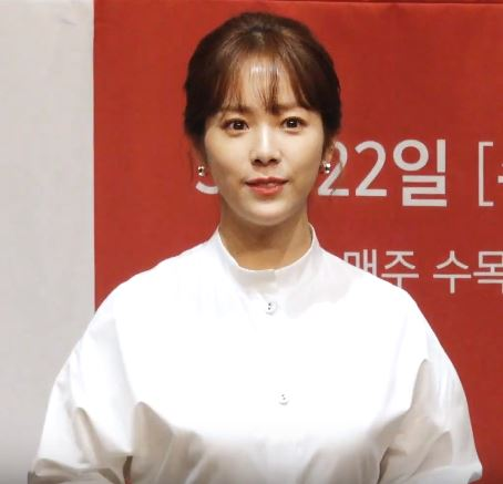 배우 한지민, 정해인이 20일 오후 서울 구로구 라마다 호텔에서 열린 MBC 드라마 '봄밤' 제작발표회에 참석했다.